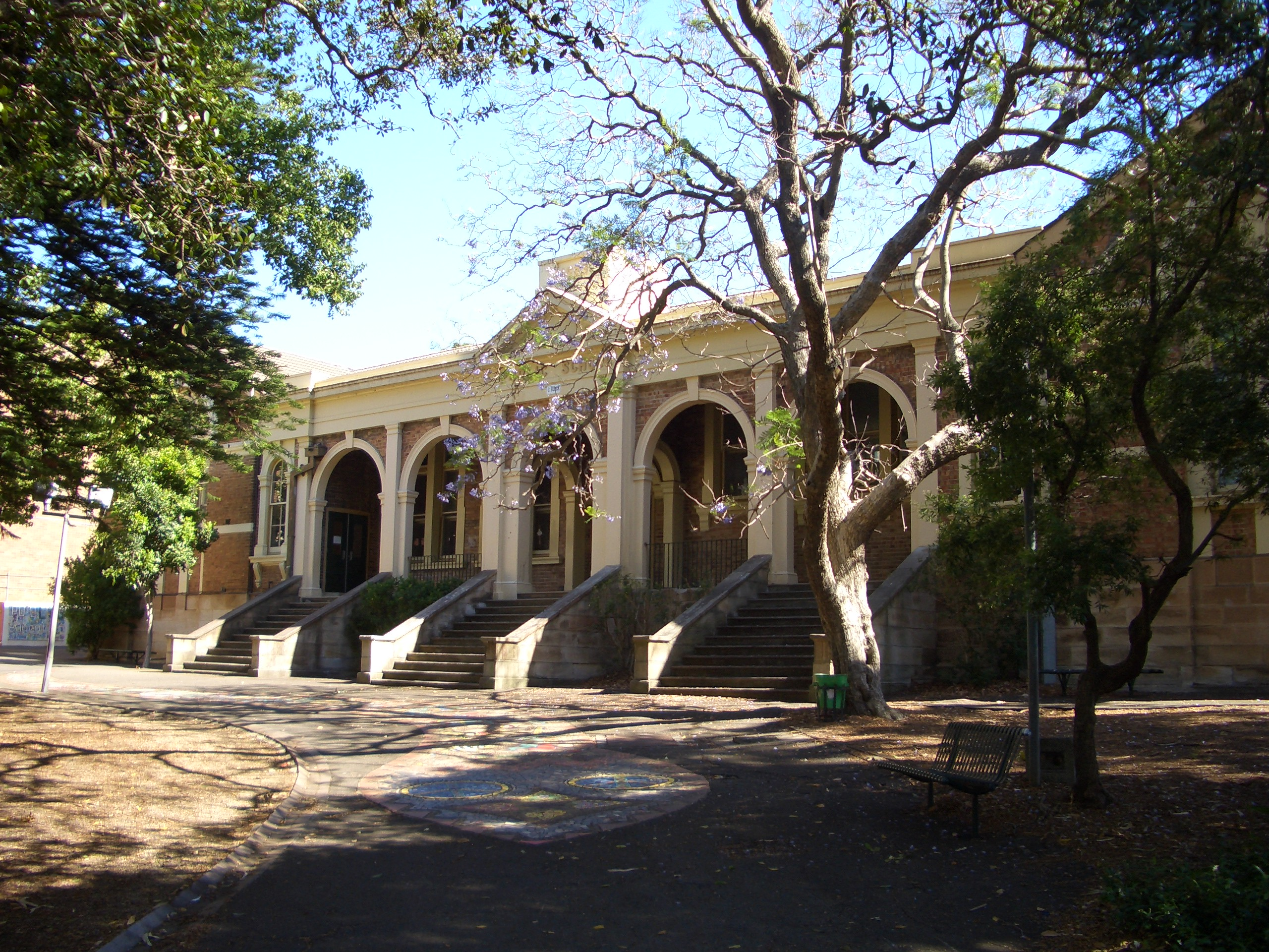 Stanmore